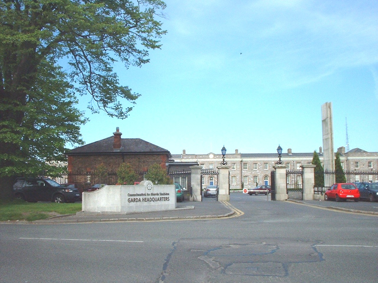 Garda HQ, Phoenix Park, DublinGarda HQ